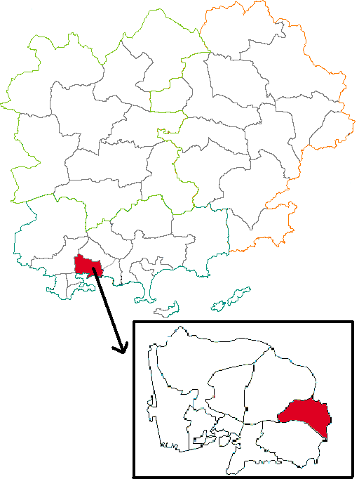 Situation du canton dans le département du Var (83), France